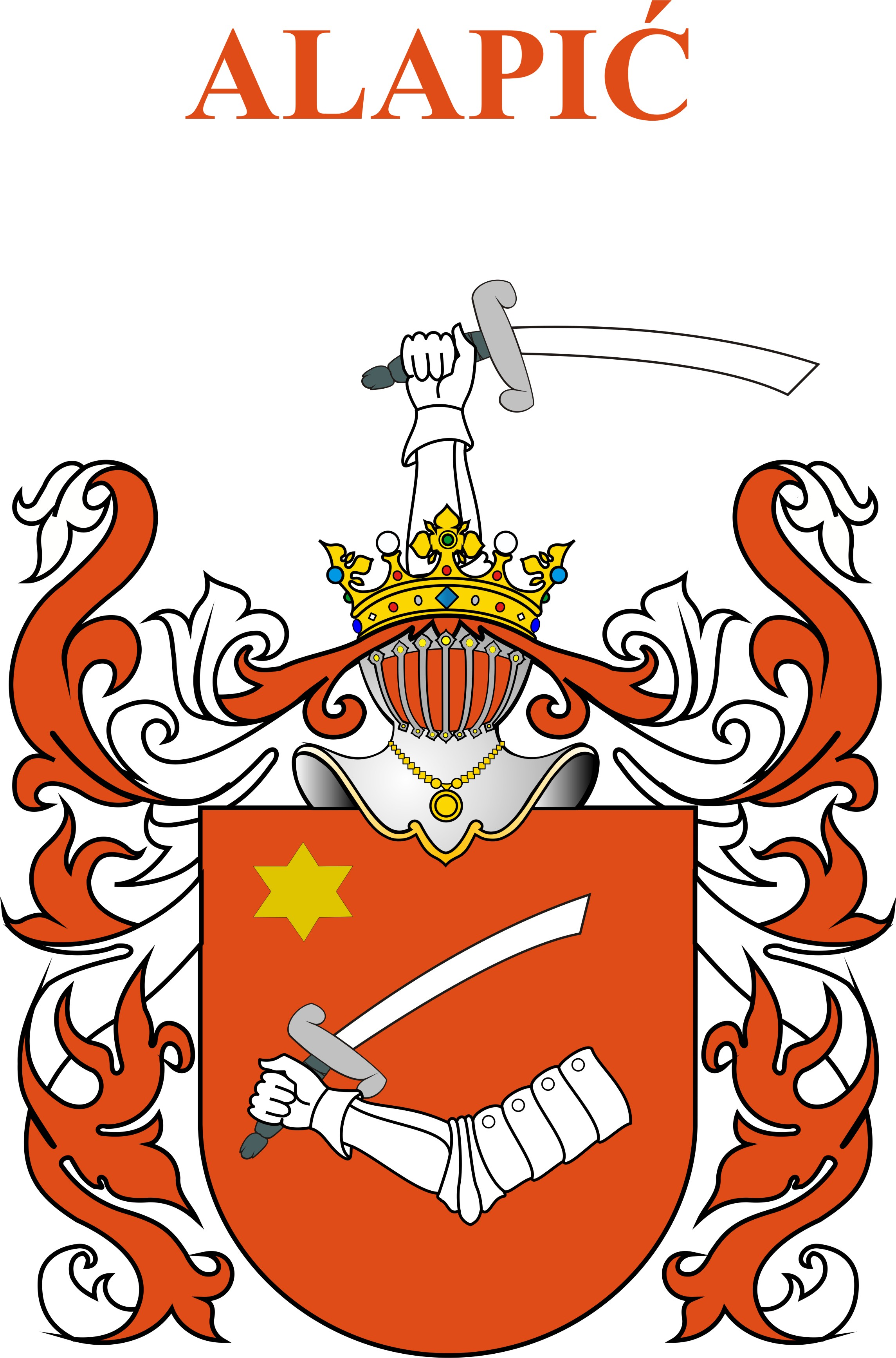 Grb obitelji Alapić (Alapy).